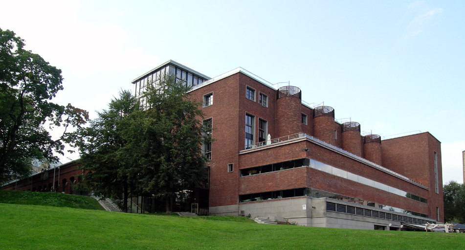 Norsk designsenter, Oslo, Norway.